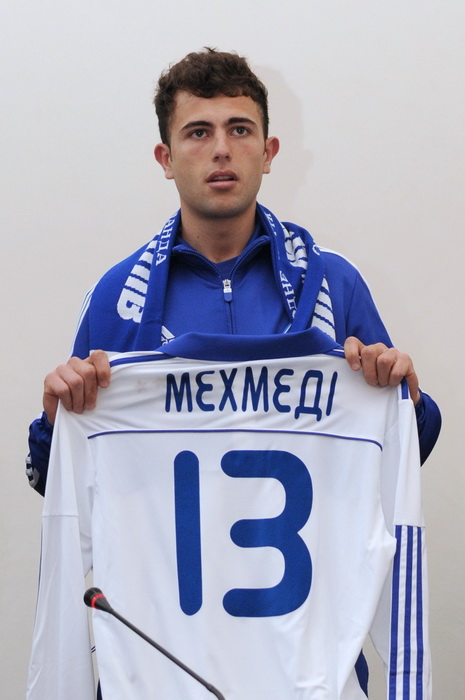 Презентация Мехмеди Перший сорочку Динамо Київ